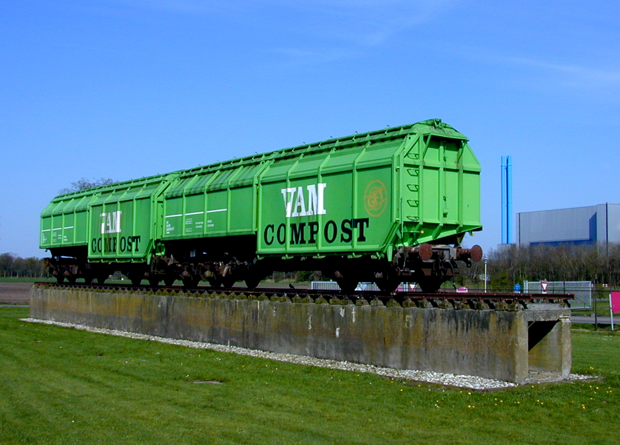 Vuil Afvoer Maatschappij (VAM) onderlossers van het type Takkls gebouwd in 1980 door Fabrika Vagona Kraljevo (Joegoslavië). Er zijn 6 wagons behouden waarvan deze twee als monument voor het Nederlands afvalverwerkingsbedrijf Attero (voorheen Essent Milieu) te Wijster. Zie ook: [1]